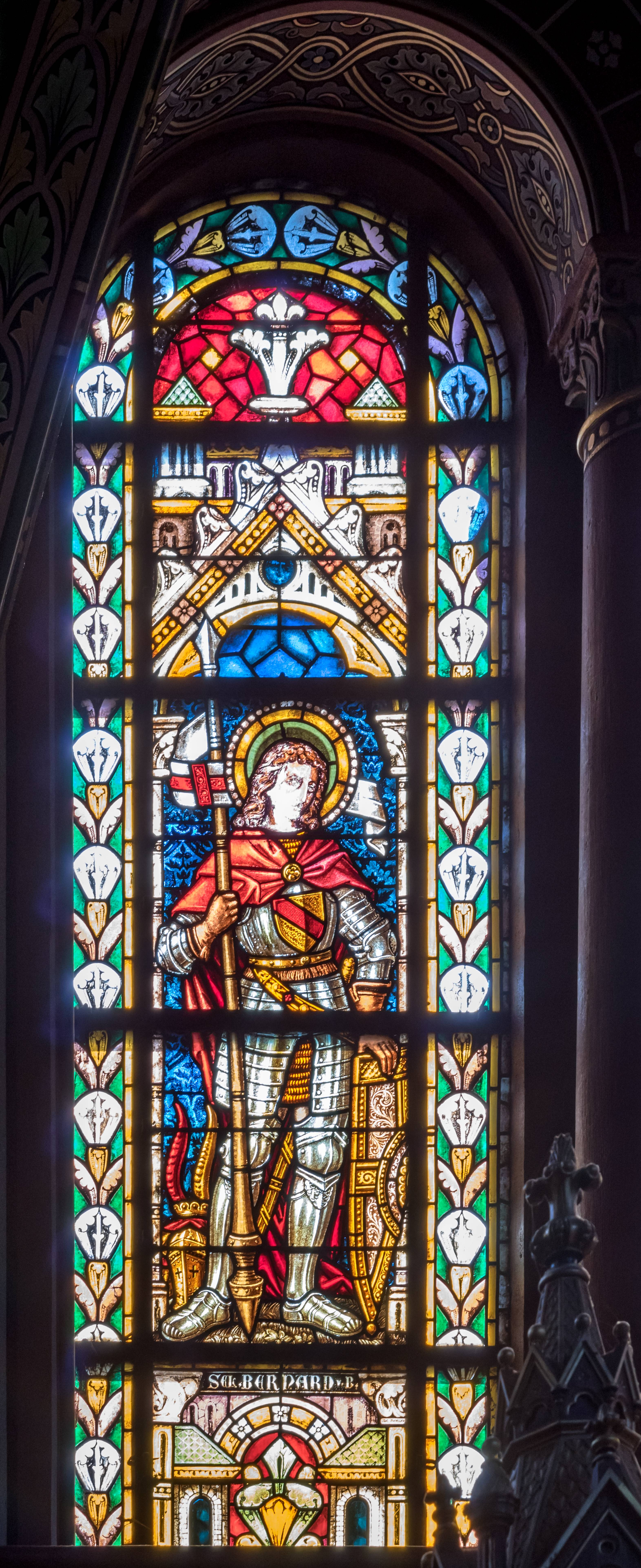 St. Peter und Paul in Bonndorf Die Glasfenster im Chor in der Kirche